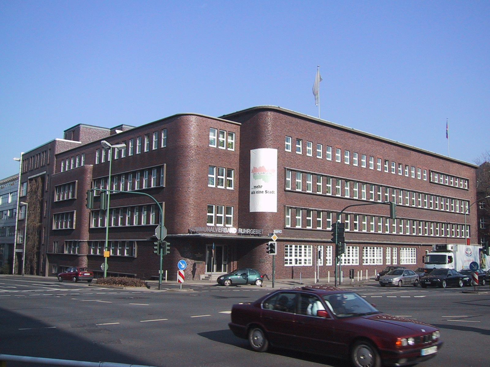 Gebäude des Kommunalverband Ruhrgebiet (KVR), heute Regionalverband Ruhr (RVR) Administration building of the "Kommunalverband Ruhrgebiet", called in 2006 "Regionalverband Ruhr" Date: Feb 2003, Essen, Germany Author: Maschinenjunge Licence: see below. Regionalverband_Ruhr